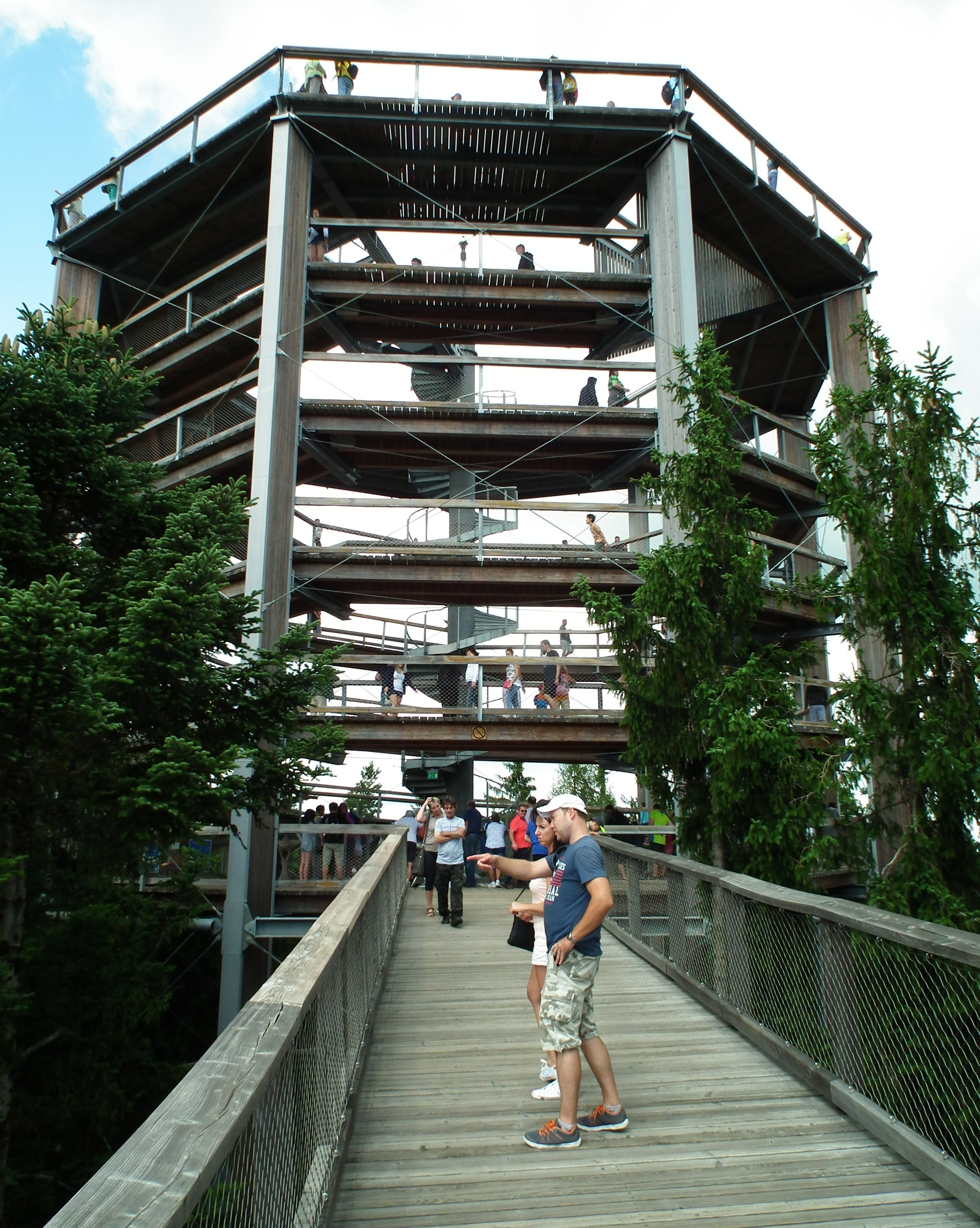 Stezka korunami stromů (Lipno nad Vltavou). Wieża widokowa ze zjeżdżalnią adhezyjną.